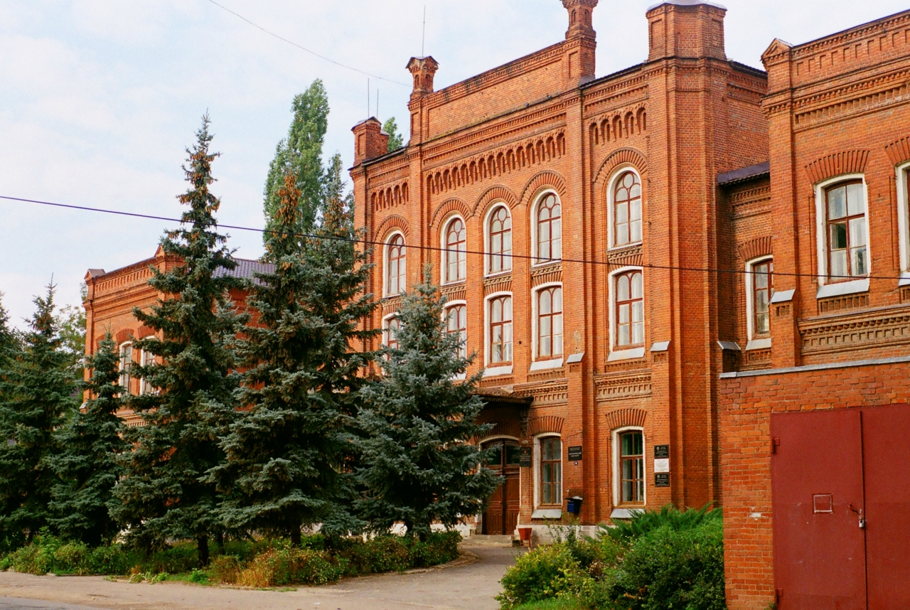 Здание гимназии (Государственный Педагогический институт): улица Ленина, 91, Елец, Липецкая область